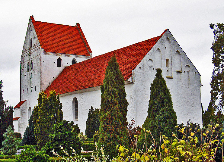 fra sydøst